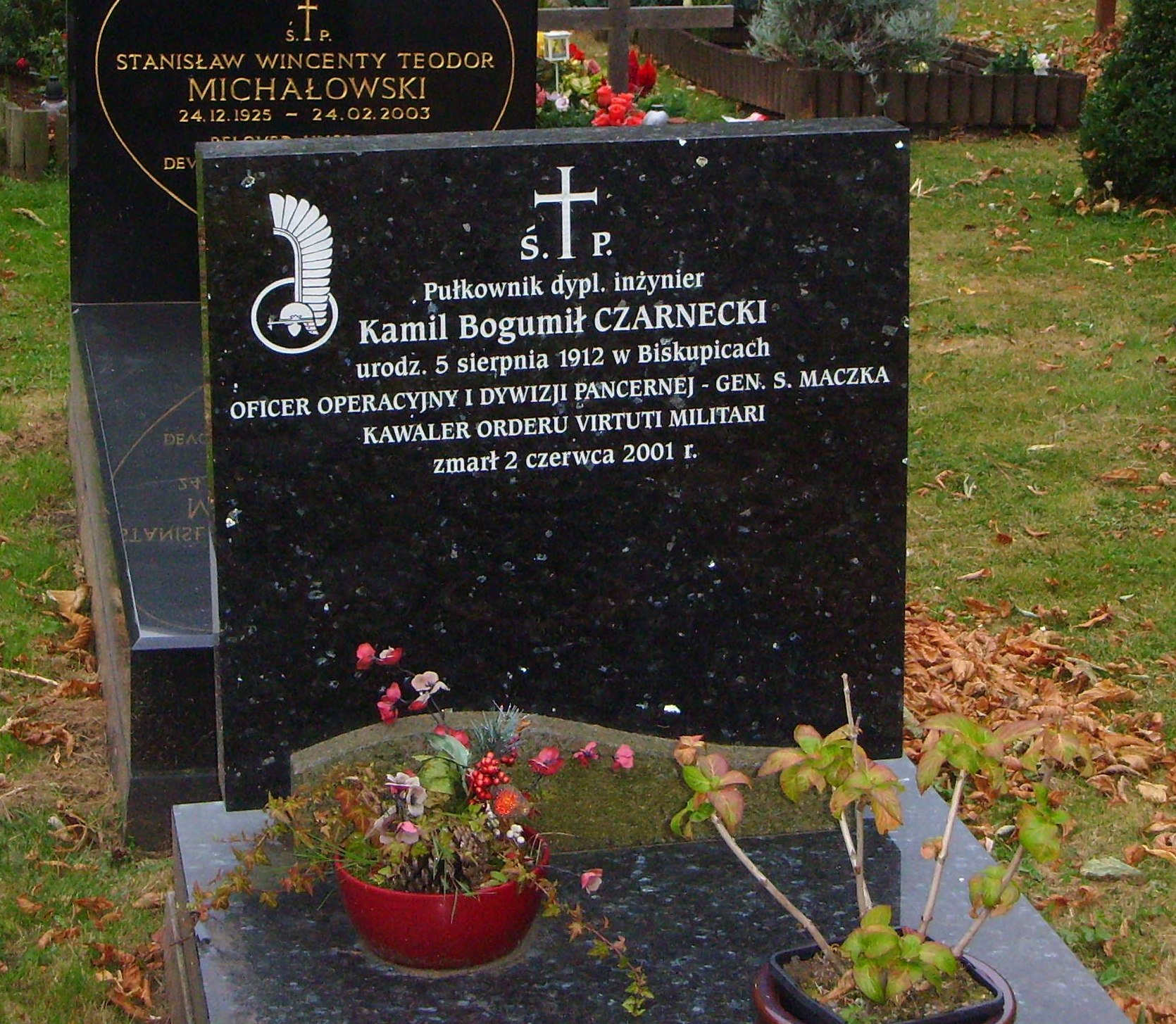 Grób Czarneckiego